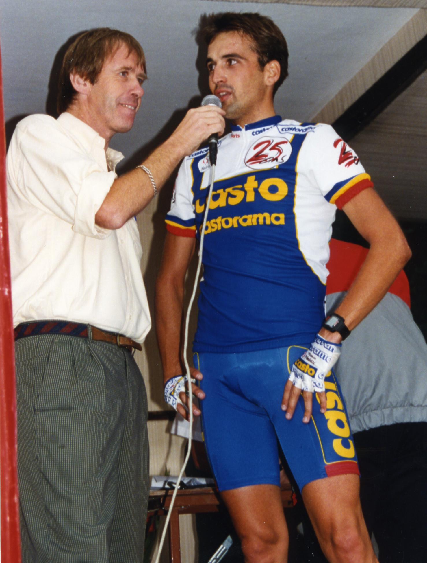 CRITERIUM DE LEVES